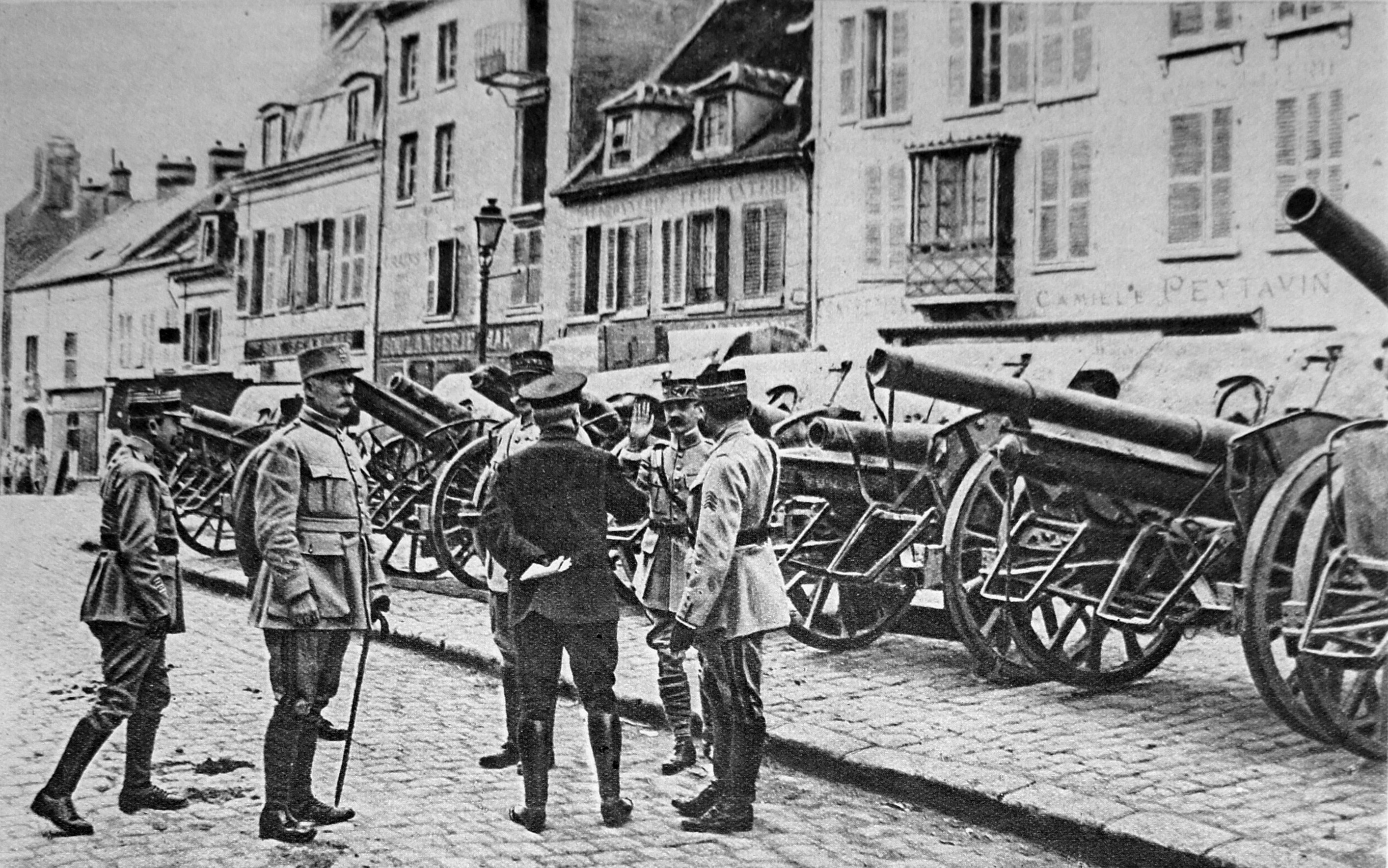 le Miroir N° 247 page 6 les généraux Gouraud Berthelot Le président Poincaré examinant des canons pris à l'ennemi, peut-être à Villers-Cotterêts .